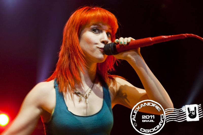 Paramore ao vivo no Credicard Hall - 20 de fevereiro de 2011 - São Paulo, SP, Brasil.